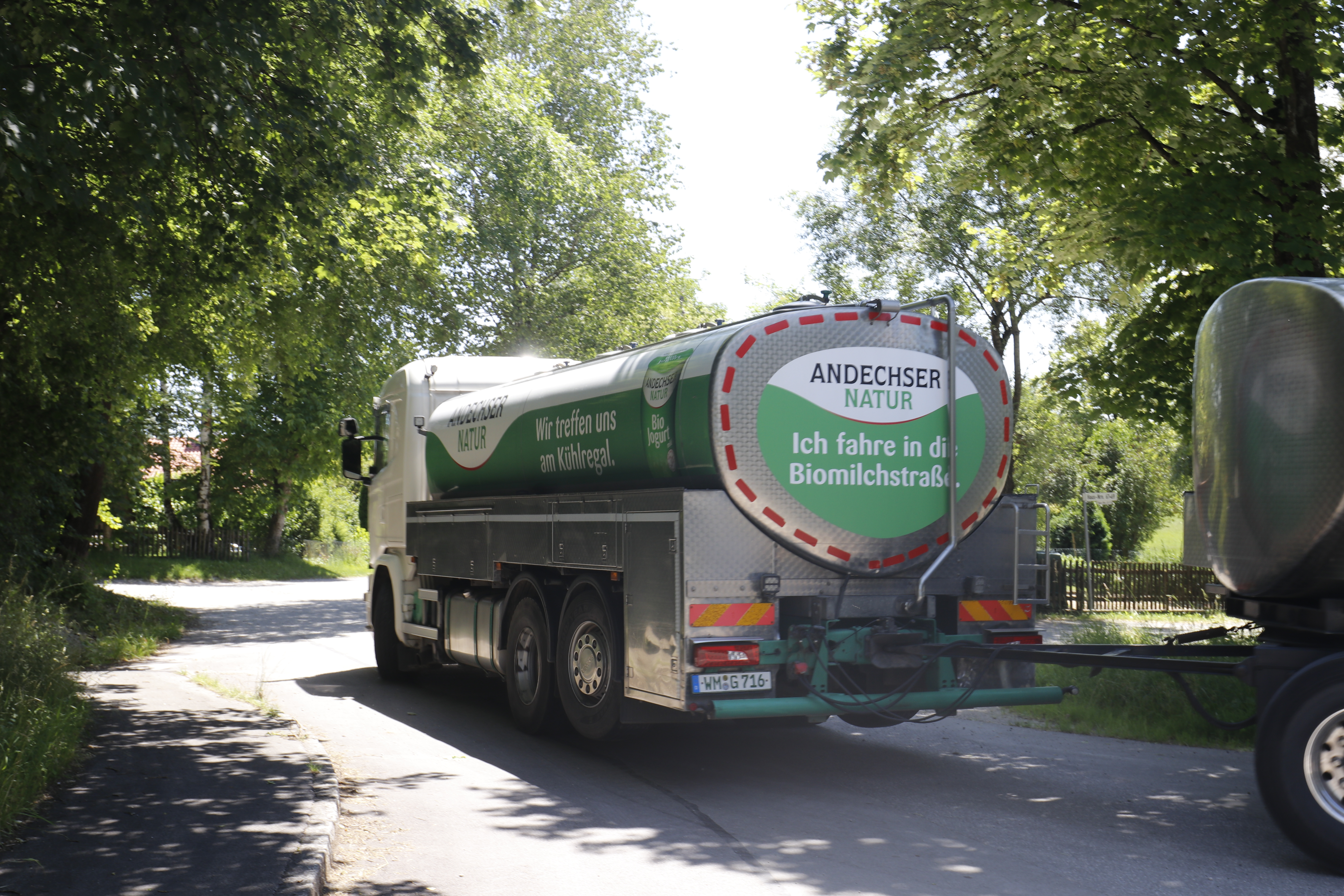 Milch-Transporter der Andechser Molkerei Scheitz